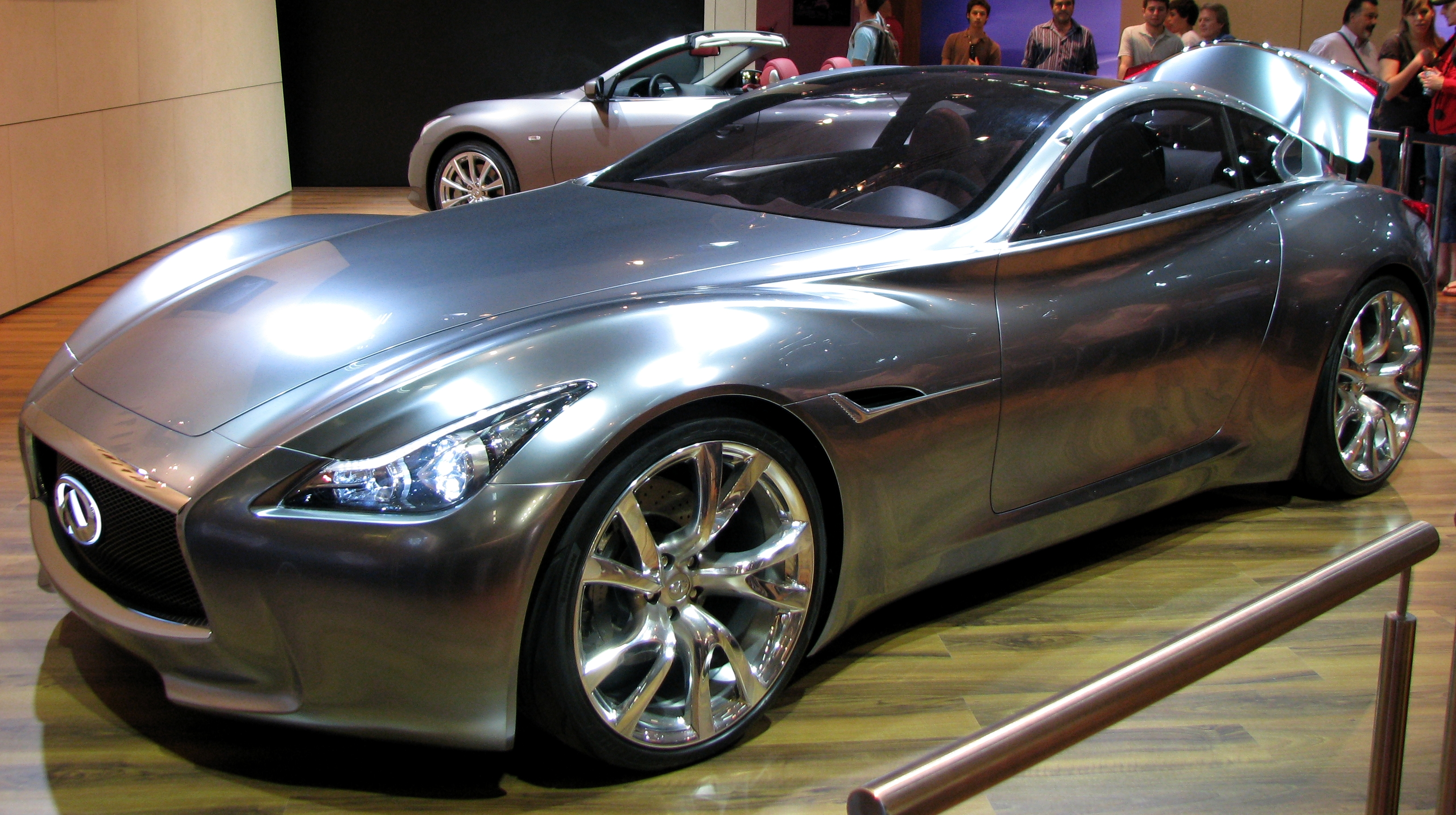 Prototipo Infiniti Essence en el Salón Internacional del Automóvil de Barcelona 2009.